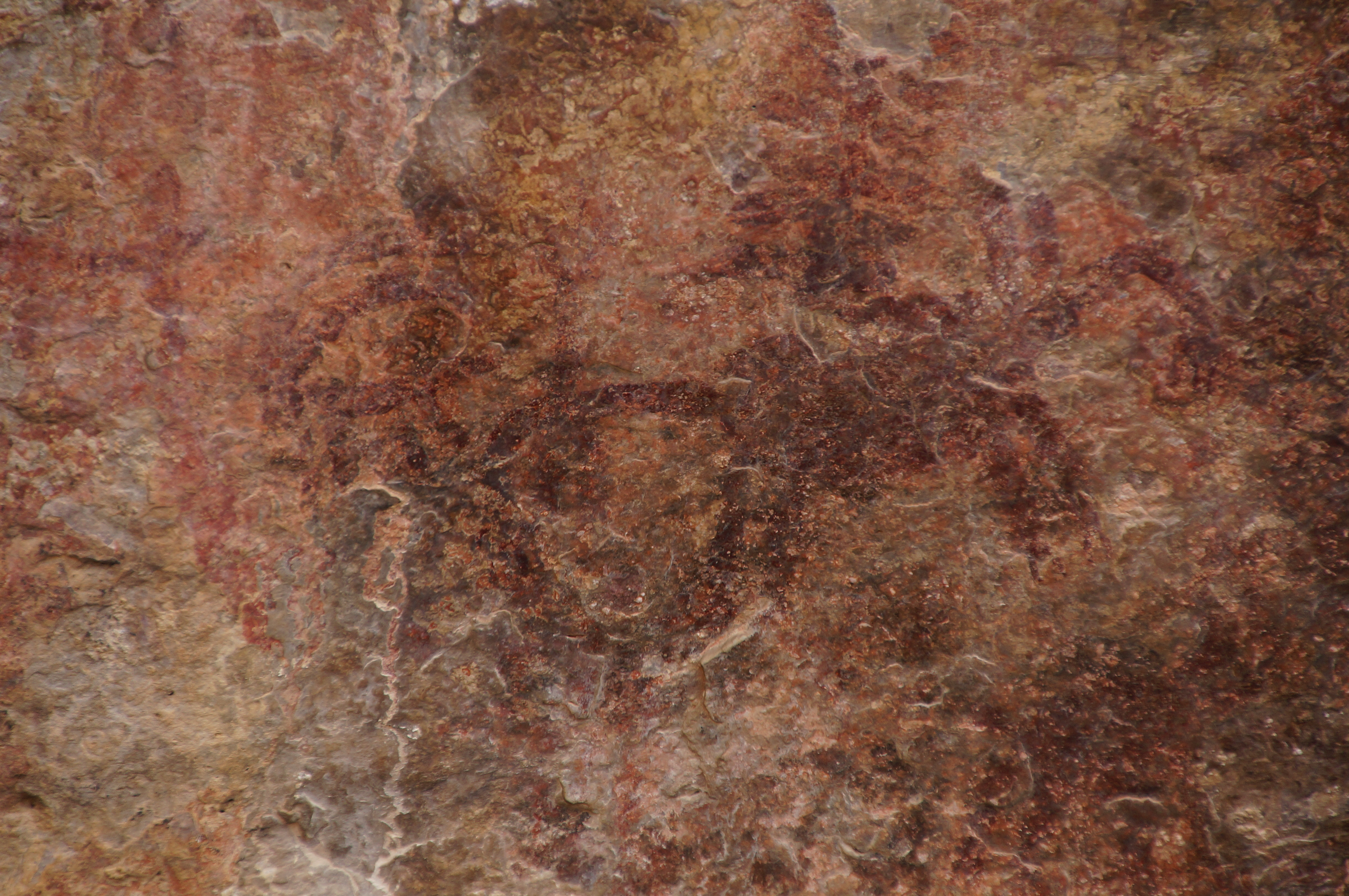 Abrics d'Ermites IV (Ulldecona)